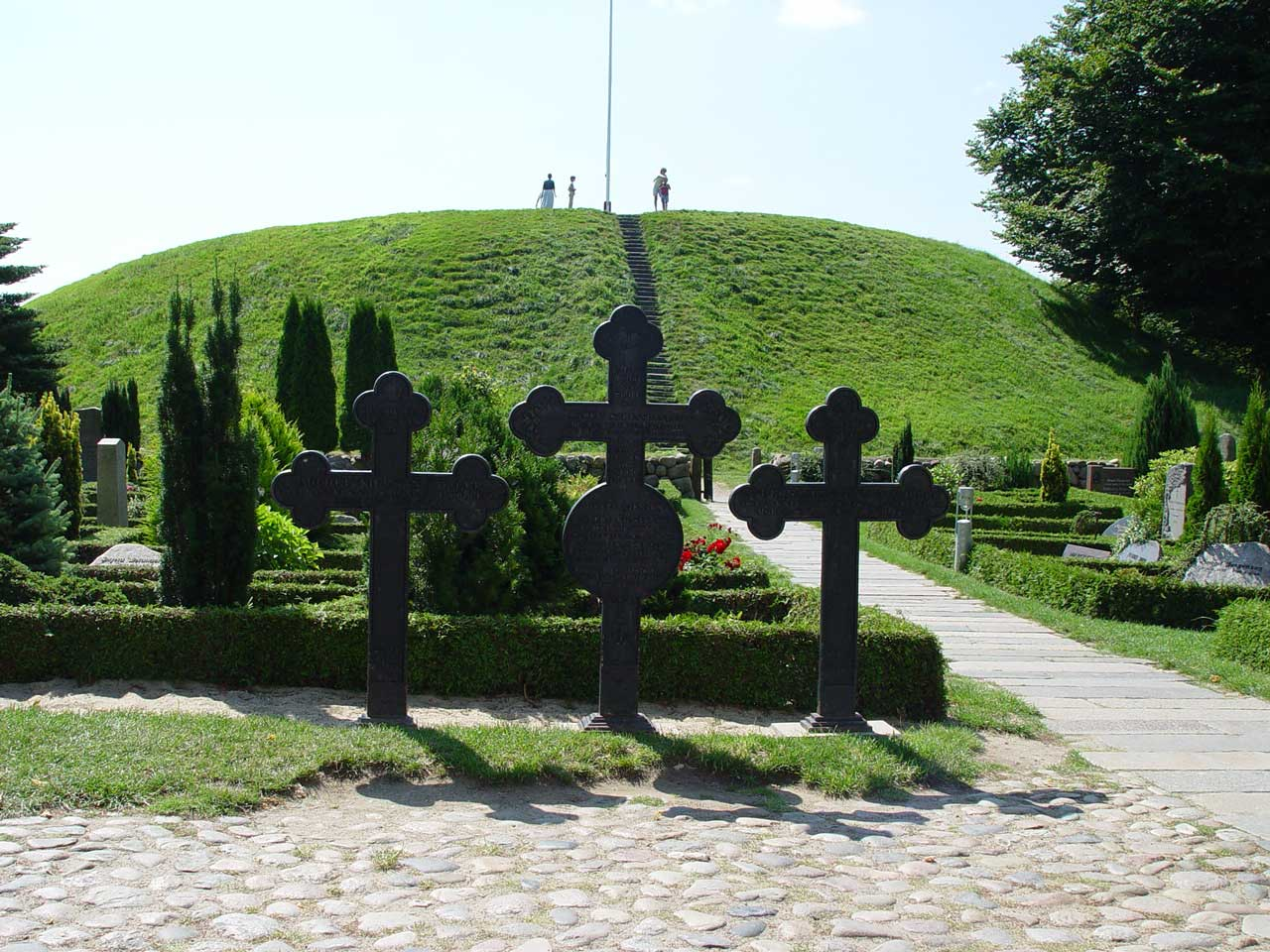 suedlicher Grabhuegel an der Kirche in Jelling (Blick von der Kirche). Gehoert zum Weltkulturerbe (UNESCO)